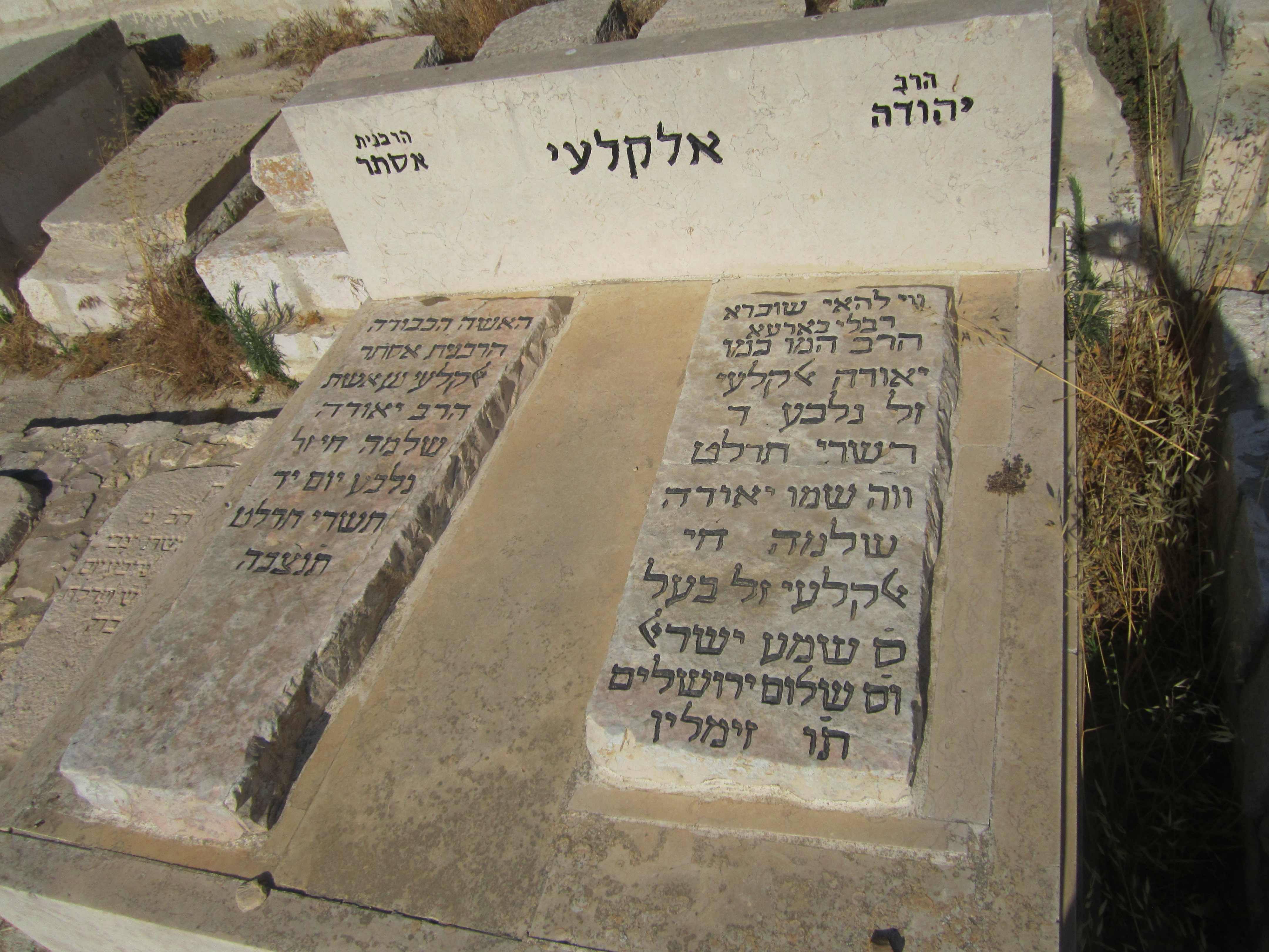 קבר הרב יהודה אלקלעי בהר הזיתים